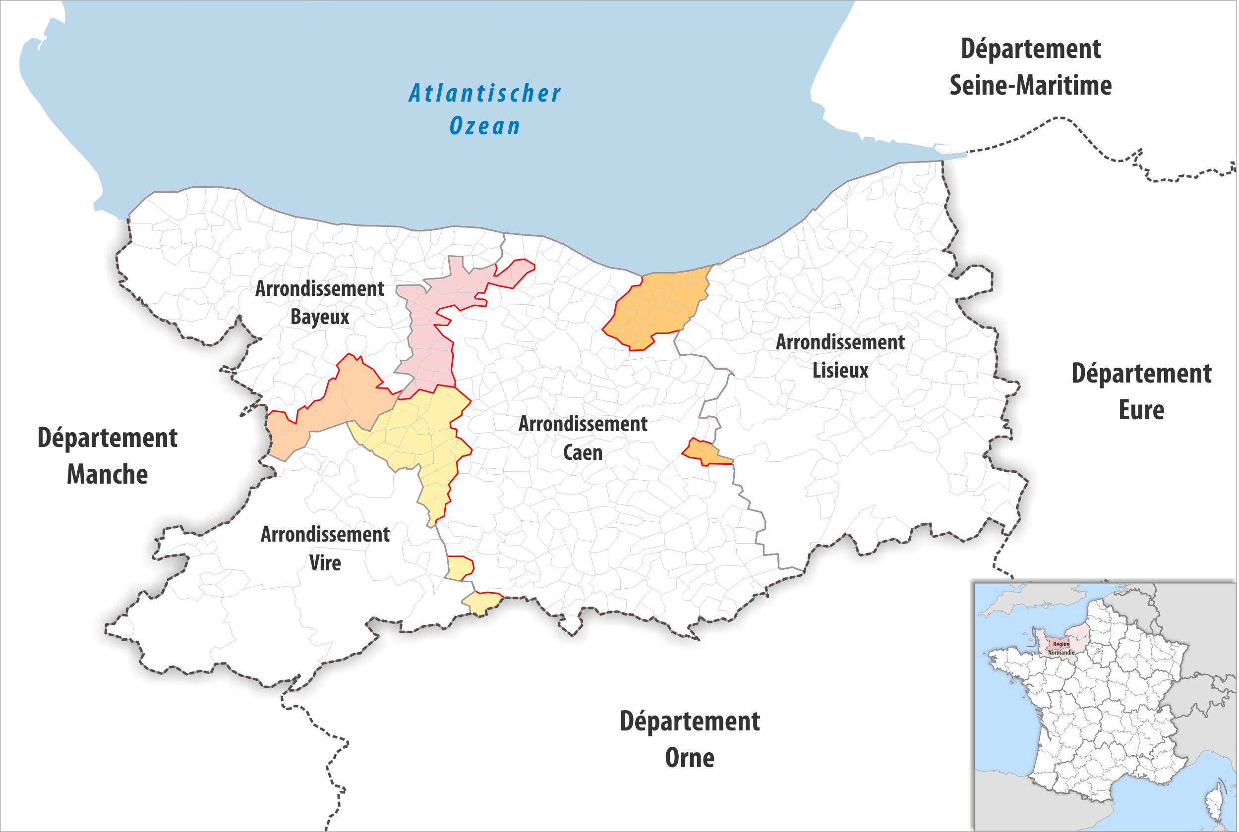 Arrondissements Anpassungen auf 2017 im Departement Calvados